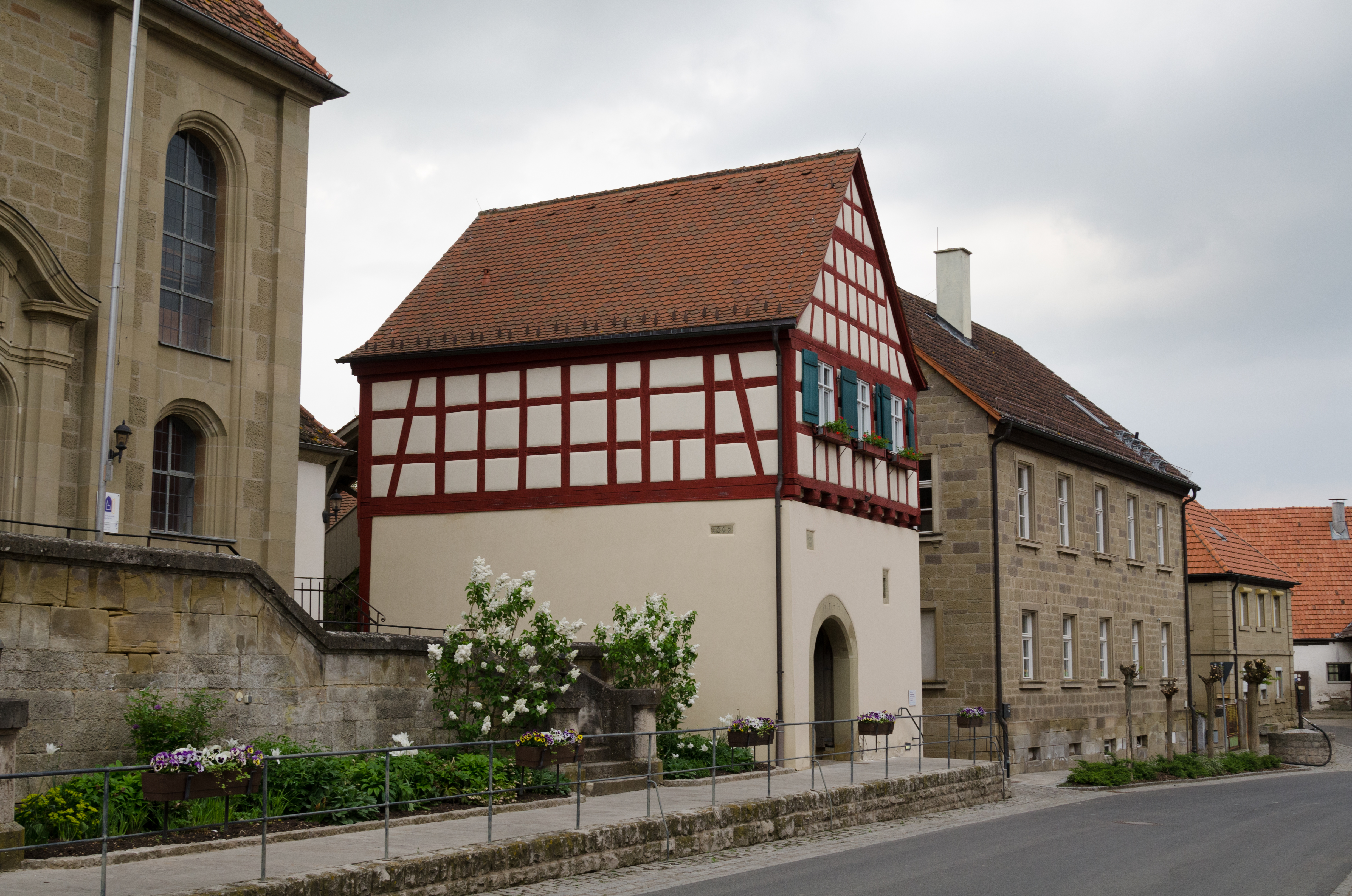 Iphofen, Nenzenheim, Kirchenburganlage